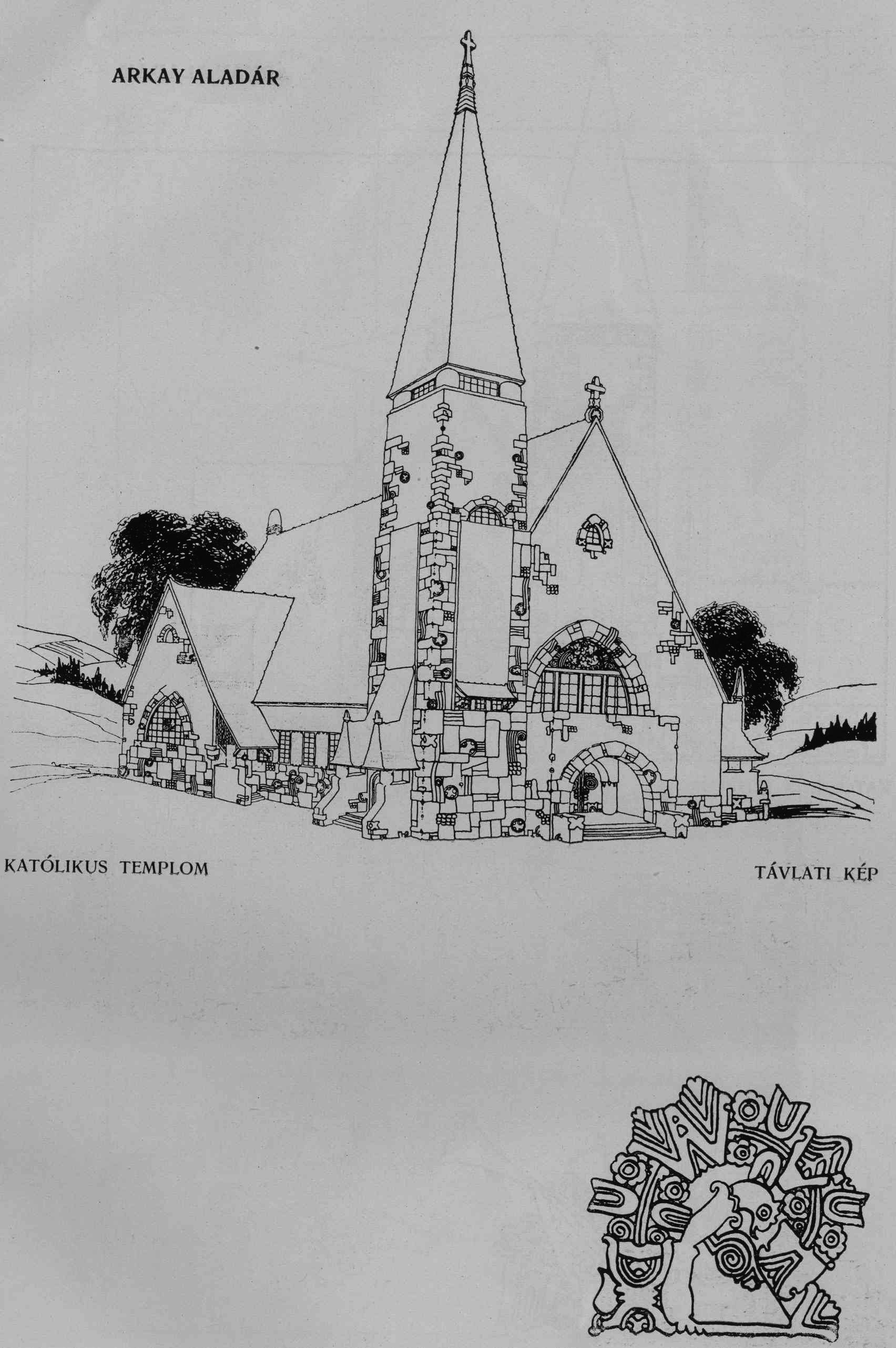 Katolikus templom terv